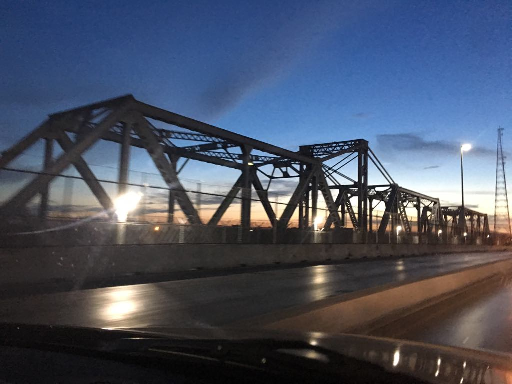 Puente Internacional B&M.